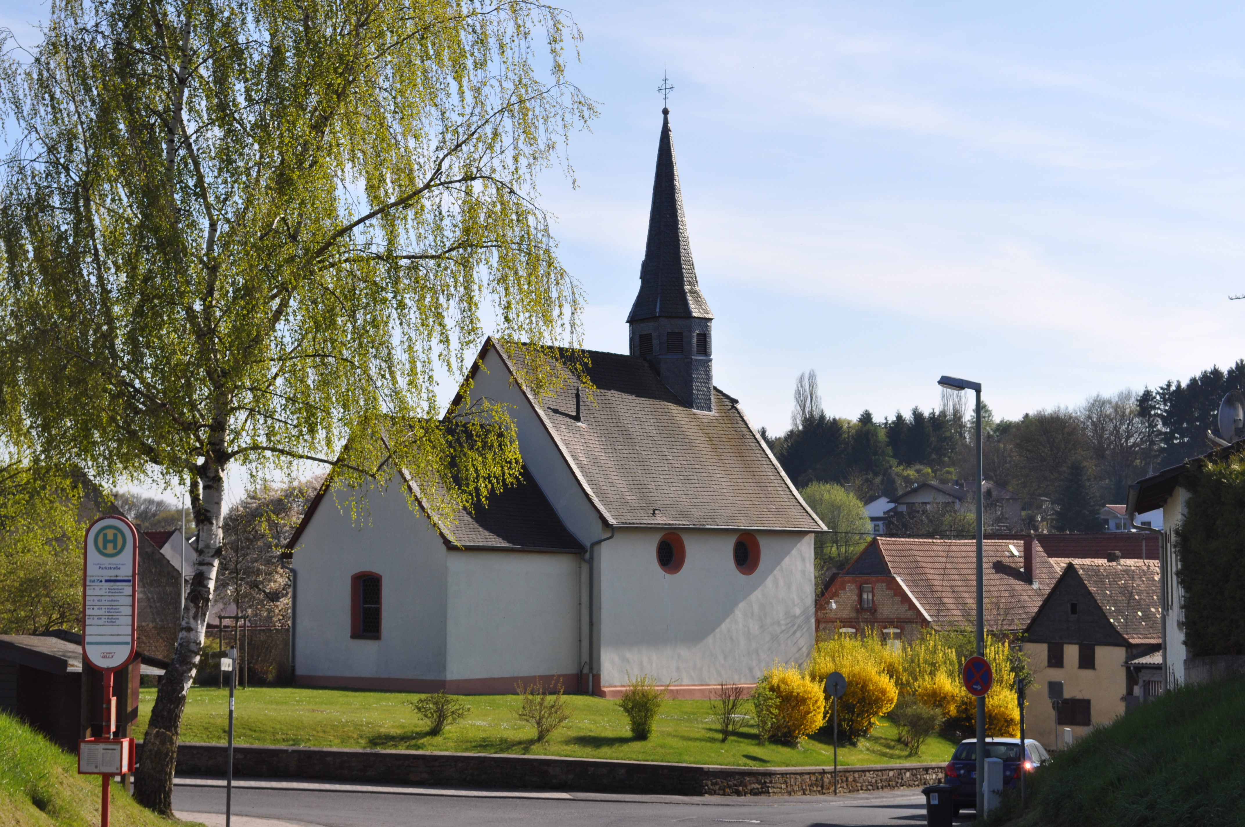 Evangelische Kirche von Wildsachsen